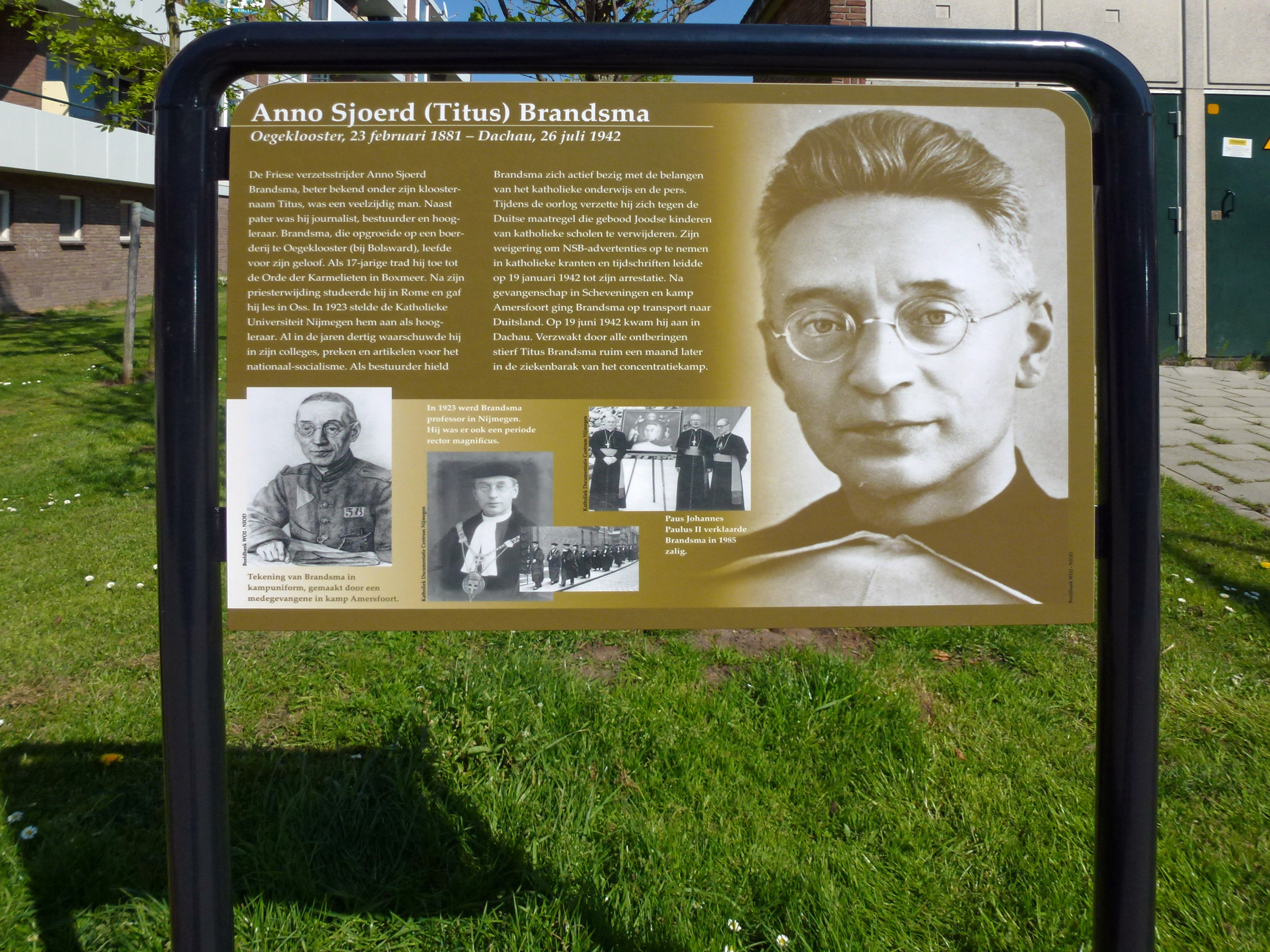 Verzetsheld Anno Sjoerd (Titus) Brandsma. Op 10 april 2014 zijn in Oosterwei 10 van in totaal 16 borden met informatie over verzetsstrijders onthuld. In Oosterwei, een wijk in Gouda, zijn na de 2e wereldoorlog, de wederopbouw, 16 straten vernoemd naar verzetsstrijders. Veel bewoners van deze straten wisten maar weinig over de verzetshelden waarnaar de straten vernoemd zijn. Zij en anderen hebben er voor gezorgd dat nu in iedere straat een informatiebord staat, zodat de gedachtenis aan deze strijders levend blijft. (De overige 6 borden zijn in april 2018 geplaatst)